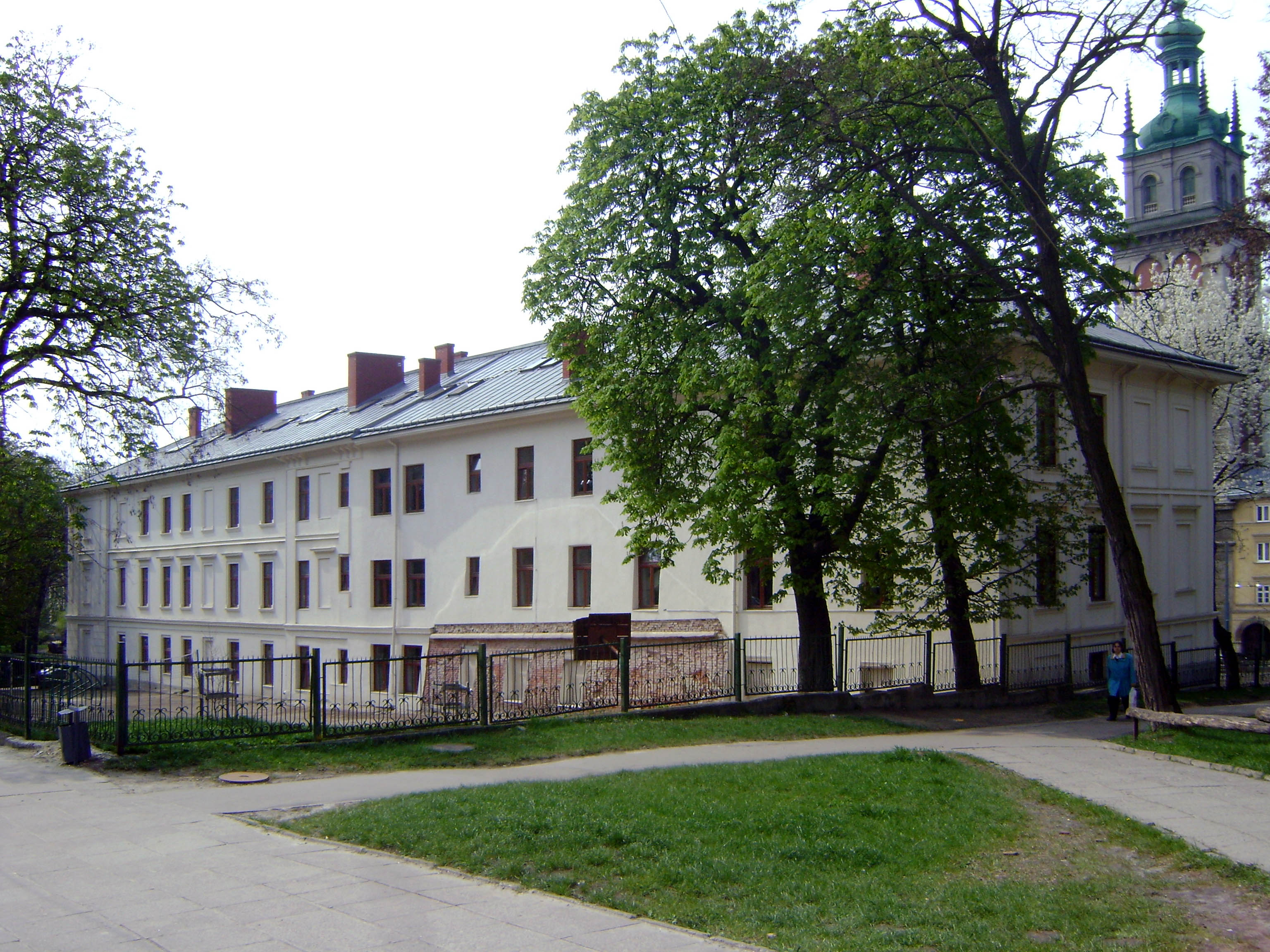 Школа № 8 у Львові.